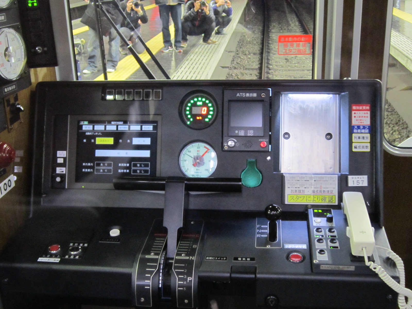 阪急1000系の運転台 1000F新開地方1100